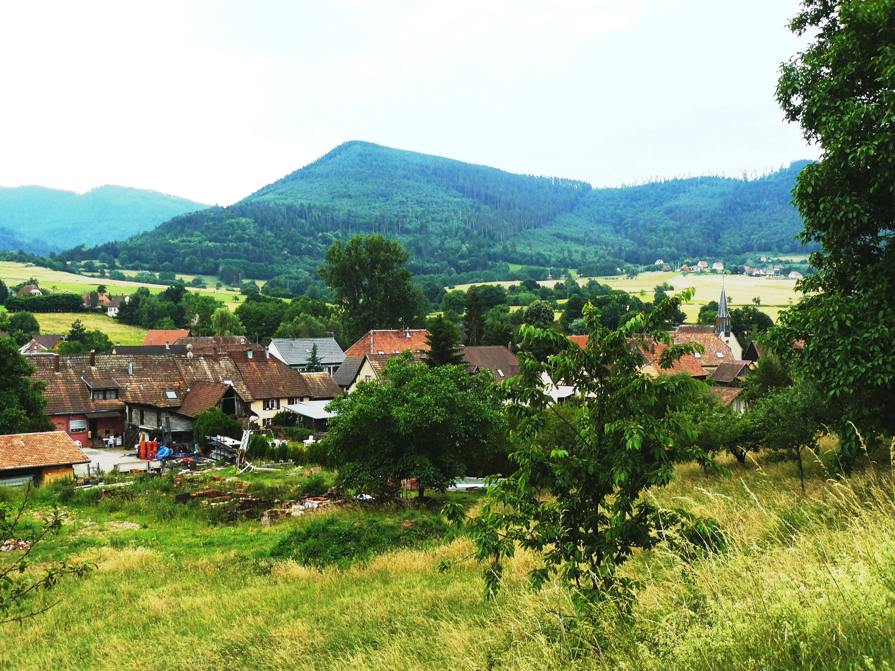 Une partie du village Bassemberg, France vue depuis les hauteurs